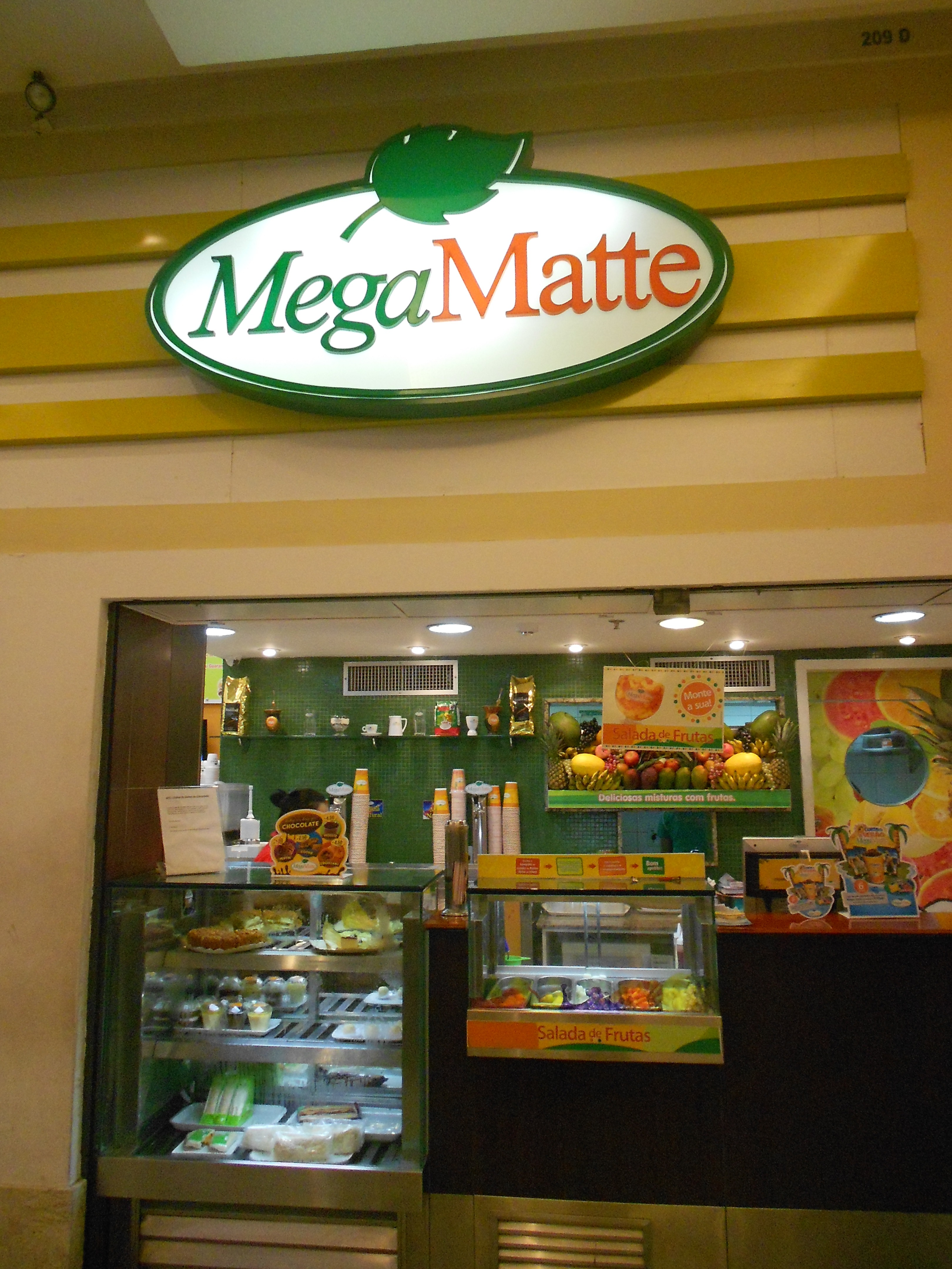 MegaMatte, no BarraShopping, Barra da Tijuca, Zona Oeste do Rio de Janeiro, Brasil.